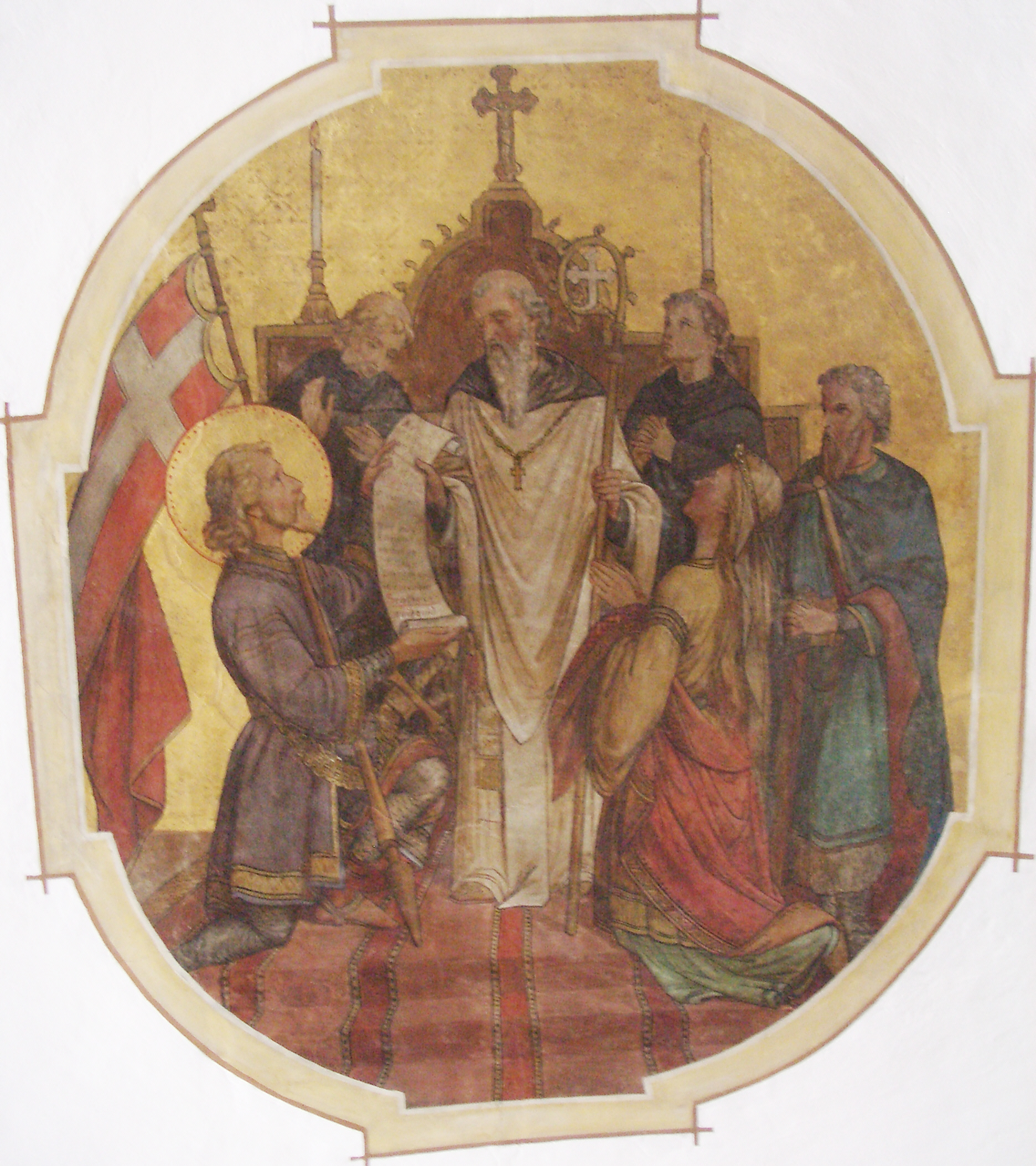 Pfarrkirche St. Dionysius, Hiltensweiler, Stadt Tettnang, Bodenseekreis Arnoldkapelle, Deckengemälde Übergabe der Schenkungsurkunde durch Ritter Arnold und dessen Gemahlin Junzela an den Abt von Kloster Allerheiligen in Schaffhausen, um 1900